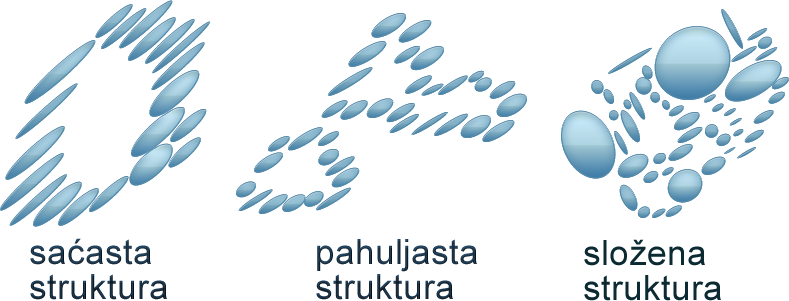 vezana struktura